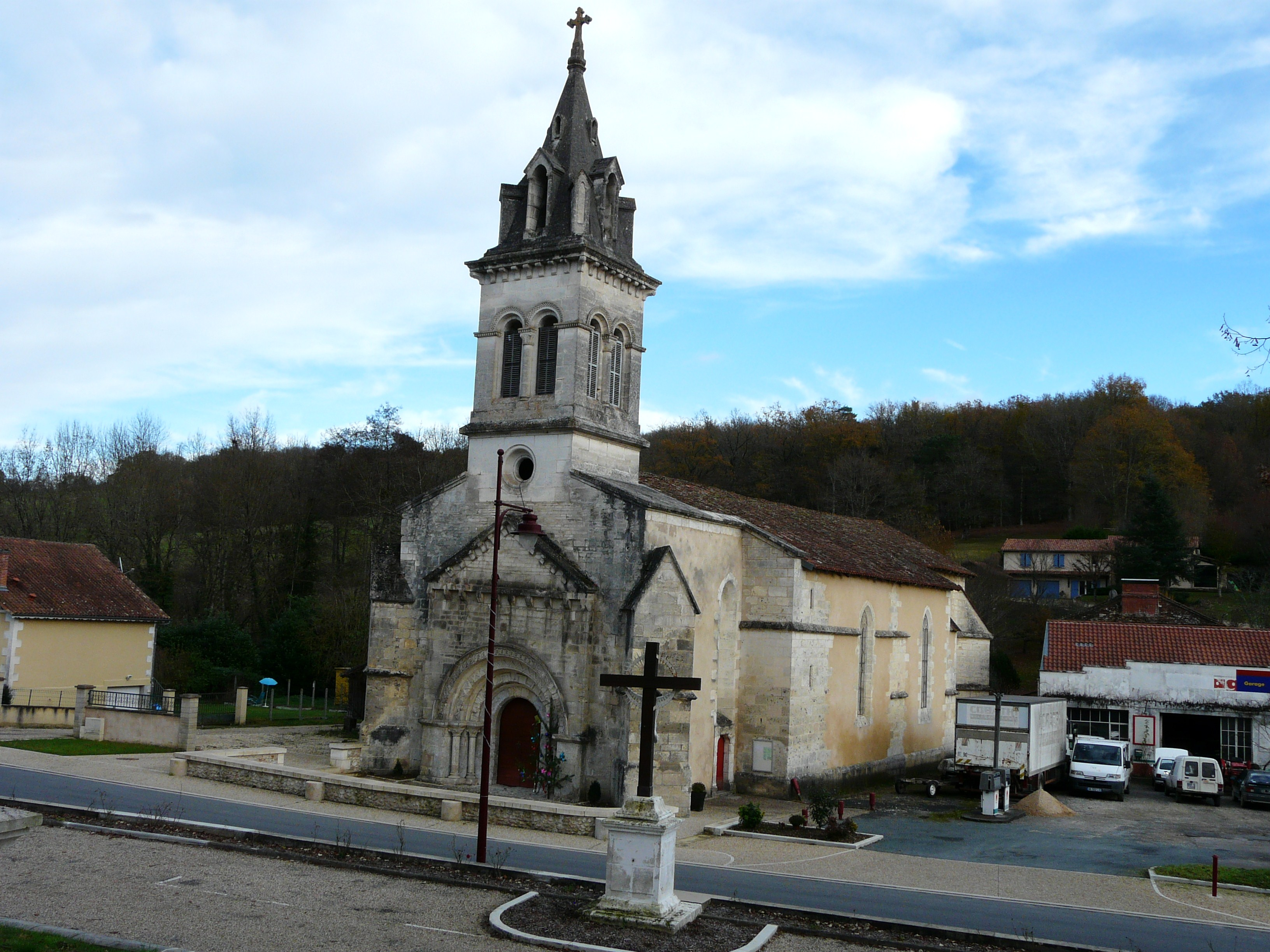 L'église Saint-Pierre-ès-Liens, Manzac-sur-Vern, Dordogne, France.